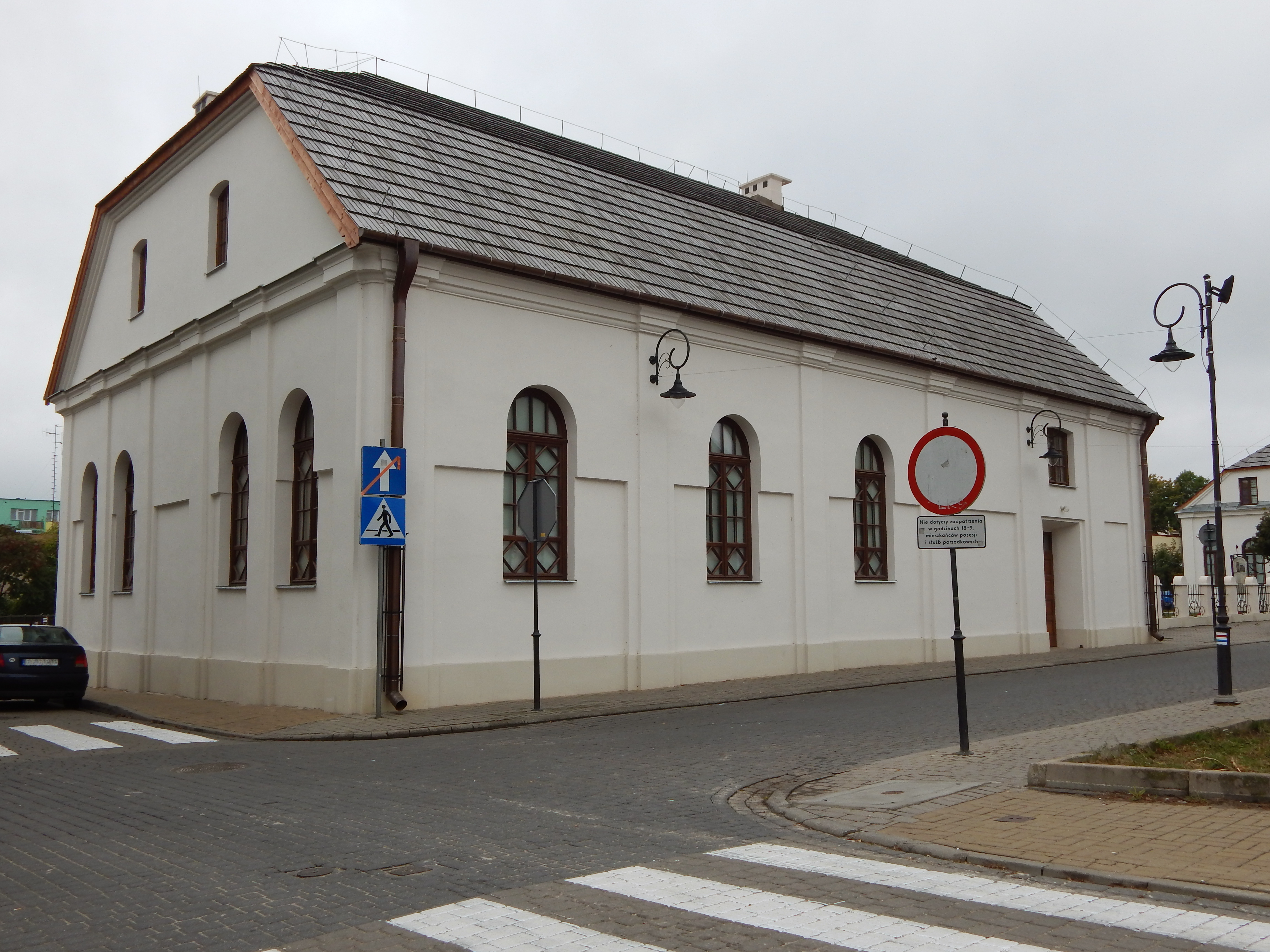 Włodawa, Mała Synagoga we Włodawie